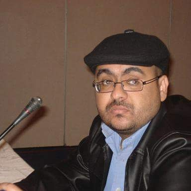 صالح البيضاني